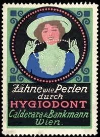 Zähne wie Perlen durch Hygiodont. Calderara & Bankmann, Wien. Größe 5x4 cm.